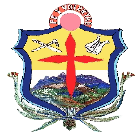 Escudo del municipio Urdaneta. Estado Trujillo. Venezuela